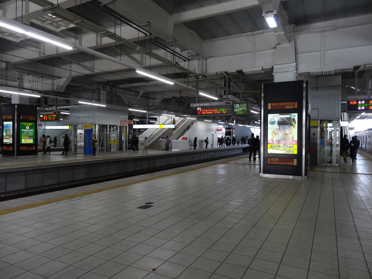 所沢駅4、5番ホームより池袋方面を臨む（2014/02/02撮影）